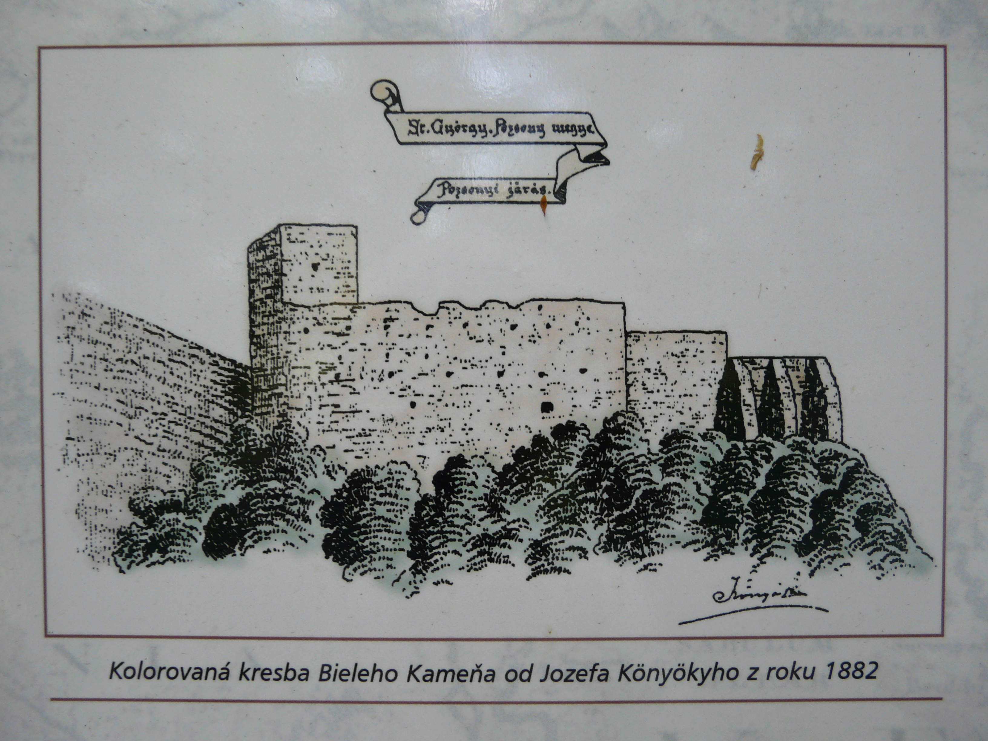 kolorová kresba Bieleho kameňa